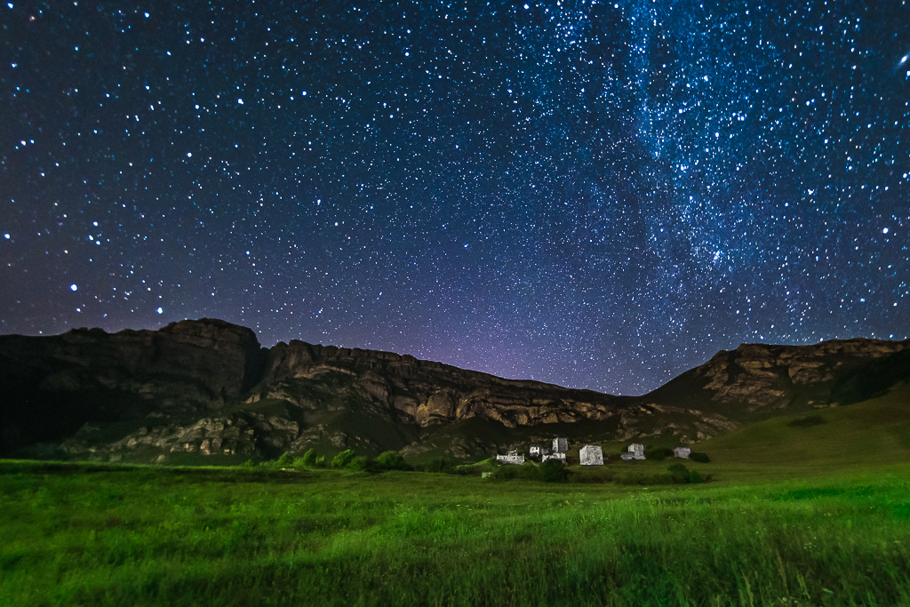 Башенный комплекс в древнем ингушском поселении Бейни (Джейрахский район, Ингушетия)